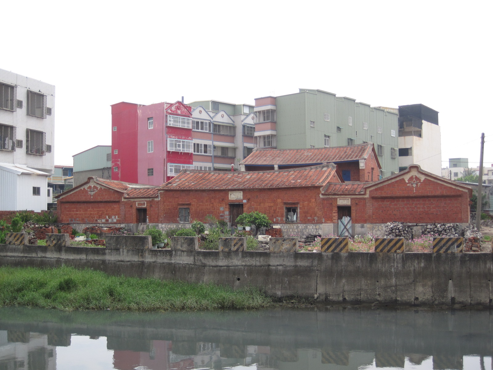 中文（台灣）: 高雄林園的港仔埔安記棧